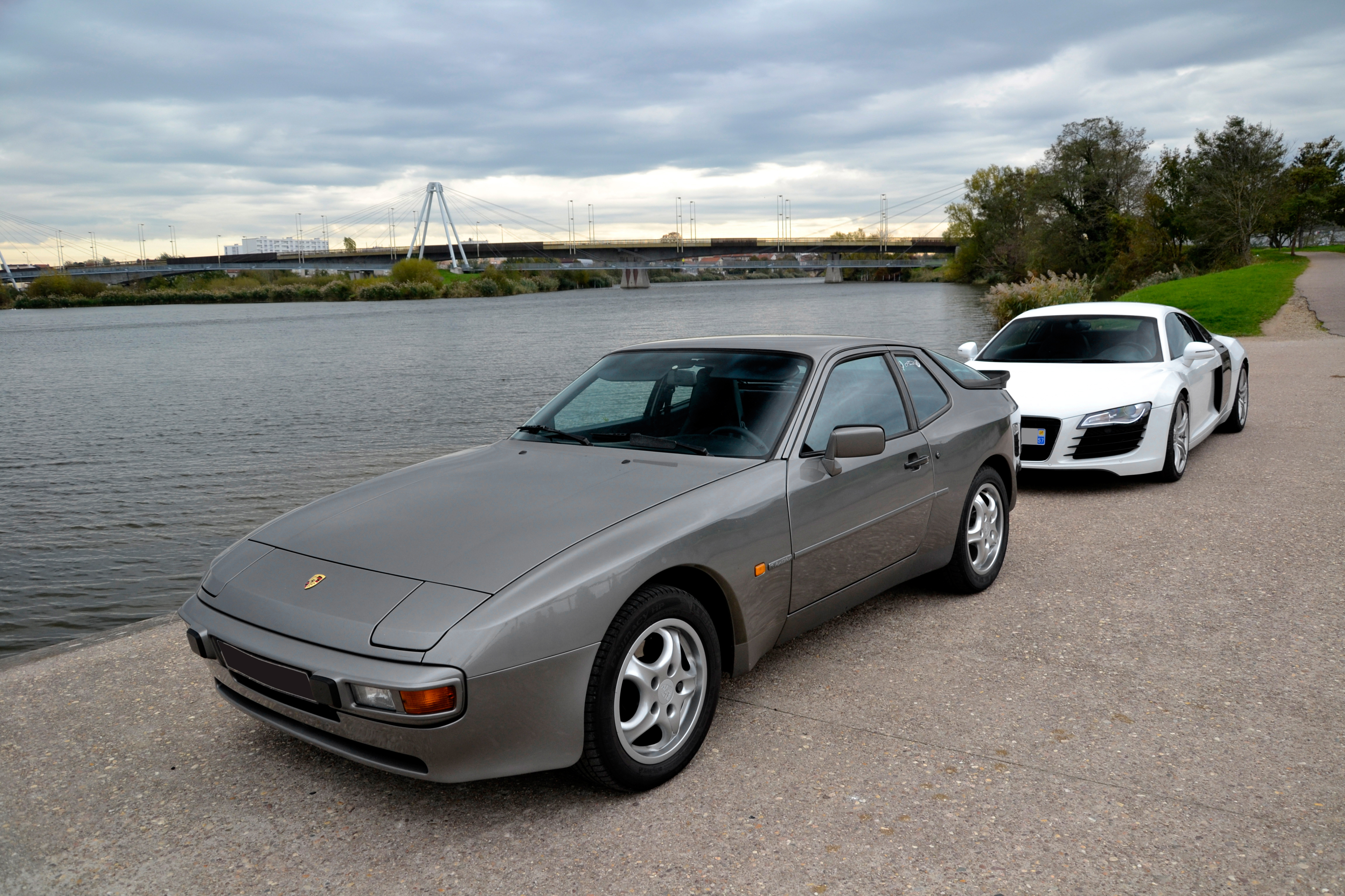 Porsche 944